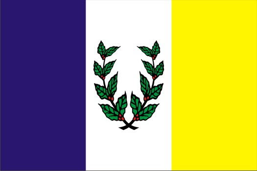 Bandeira de Atílio Vivácqua, instituído pela Lei municipal nº 092/1982 - de 08 de outubro de 1982.